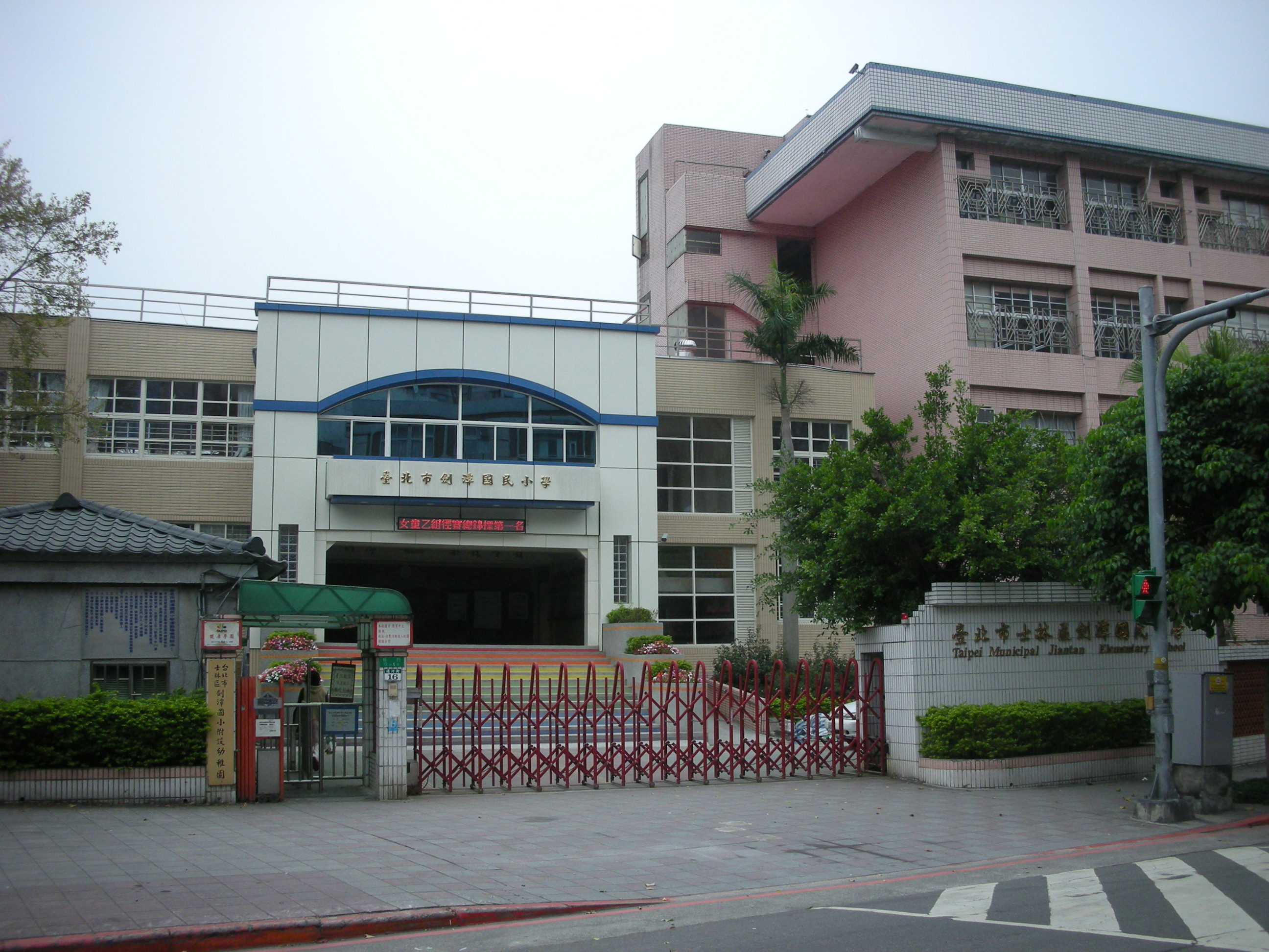 中文（台灣）: 臺北市士林區劍潭國民小學大門。